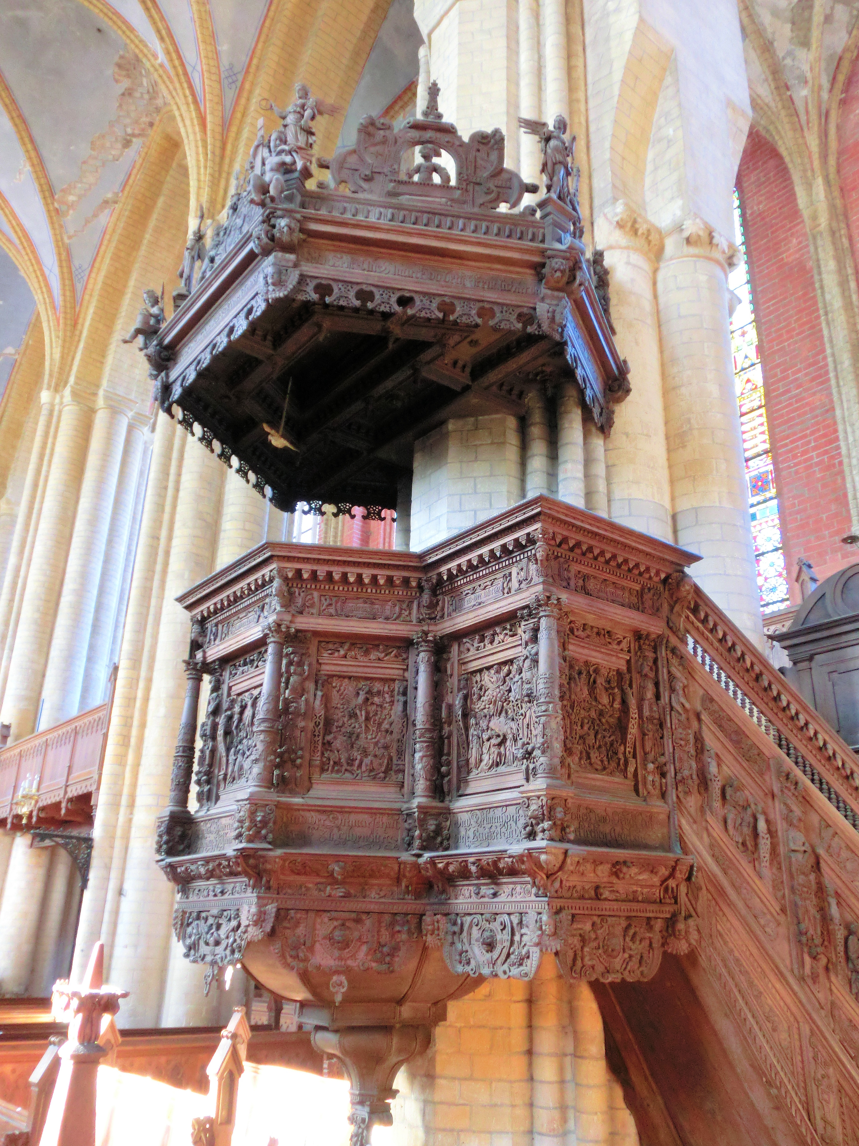 Bützow Stiftskirche Kanzel